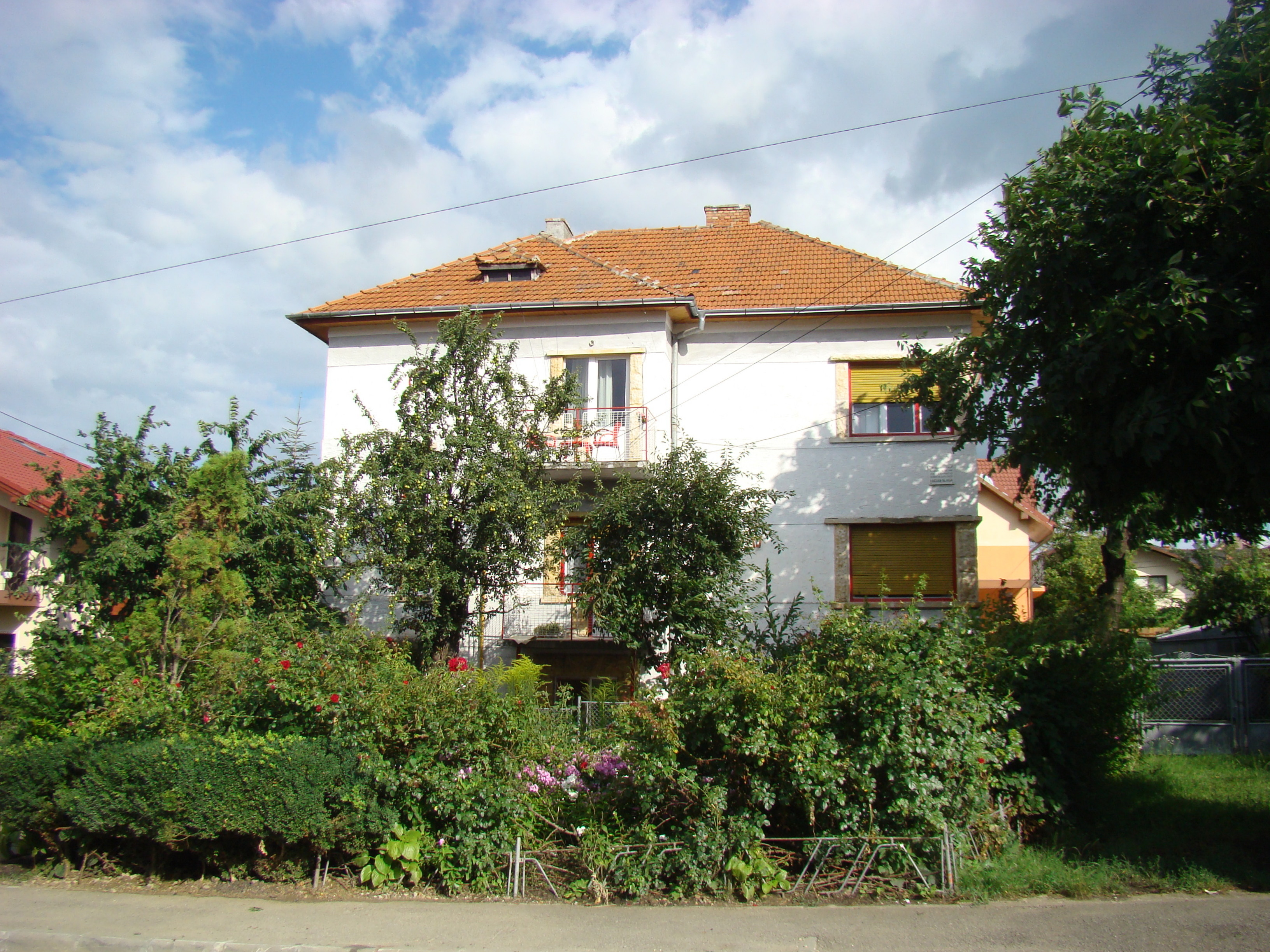 Clădire monument istoric, str.Măcinului, nr.20 (Casa în care a locuit Lucian Blaga)